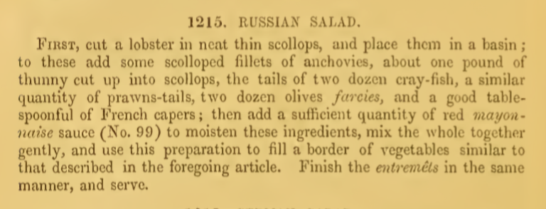 Receta de ensalada rusa según la segunda edición (1846) del recetario "The modern cook : a practical guide to the culinary art in all its branches, adapted as well for the largest establishments as for the use of private families", del cocinero anglo-italiano Charles Elmé Francatelli